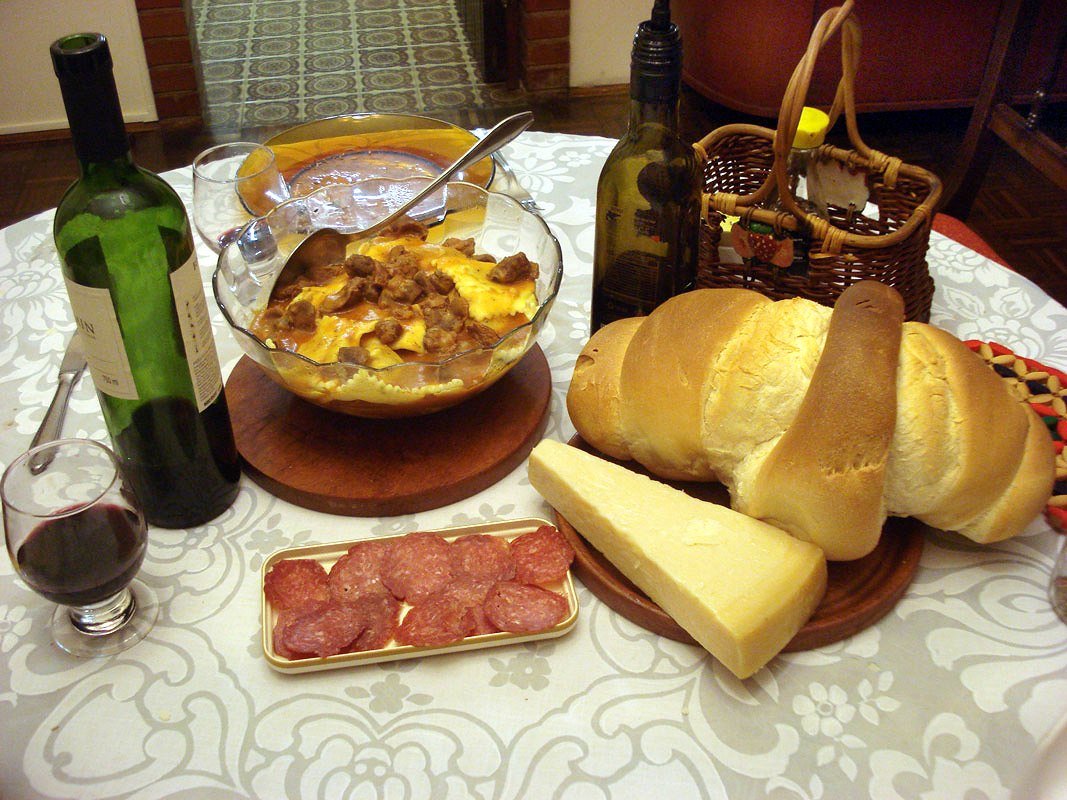 Mesa com pratos típicos italianos em Caxias do Sul: vinho tinto, tortei, salame, pão colonial e queijo parmesão.